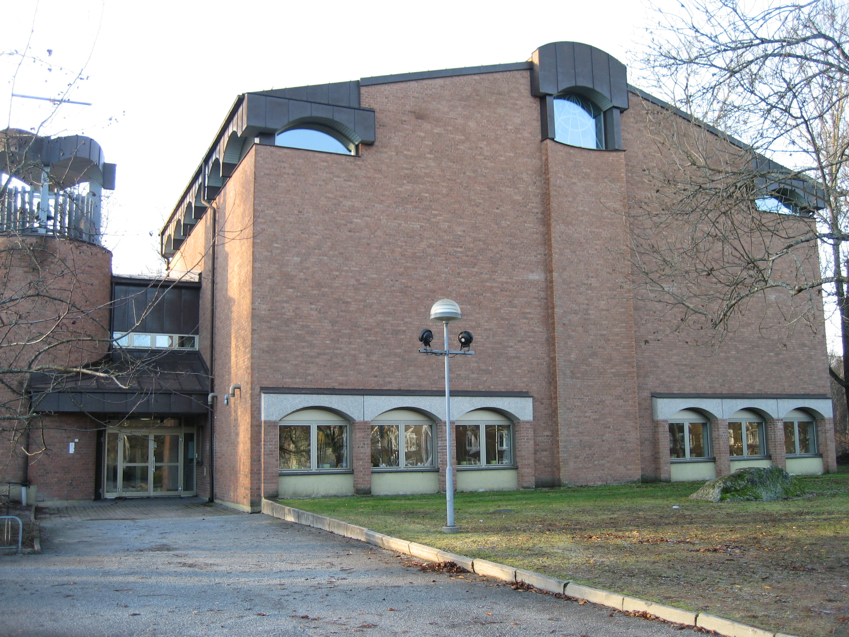 St. Mikaels kyrka, Örebro Sweden.